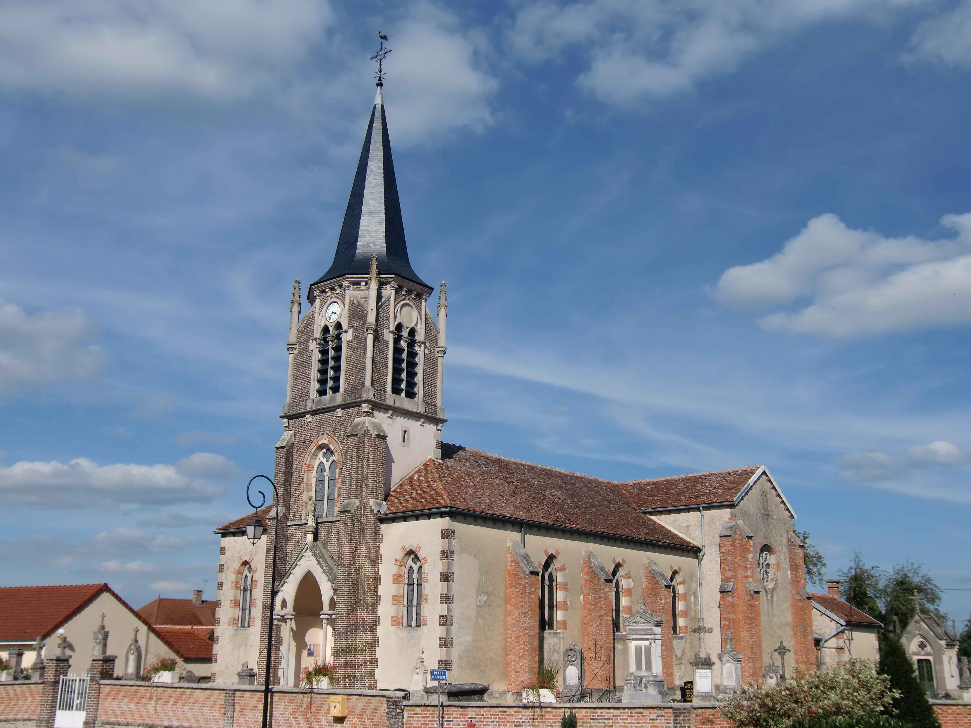 Eglise de Fresnoy-le-Château (Aube - Champagne - France)